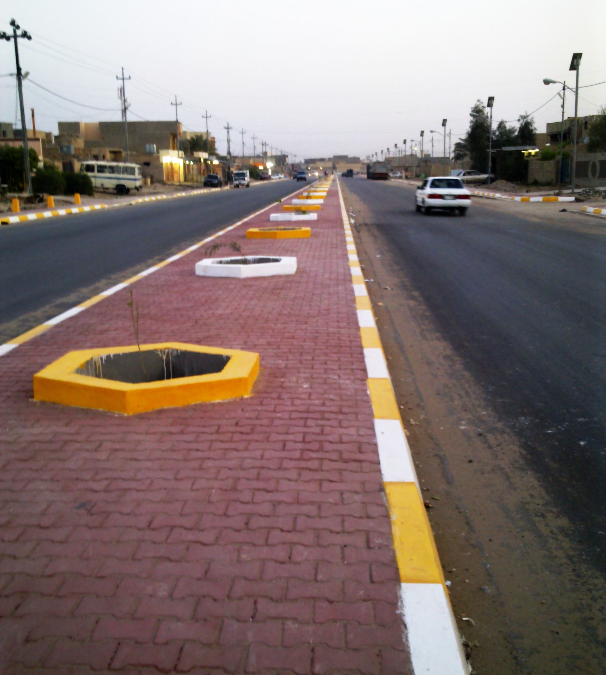 Street Nzaal new